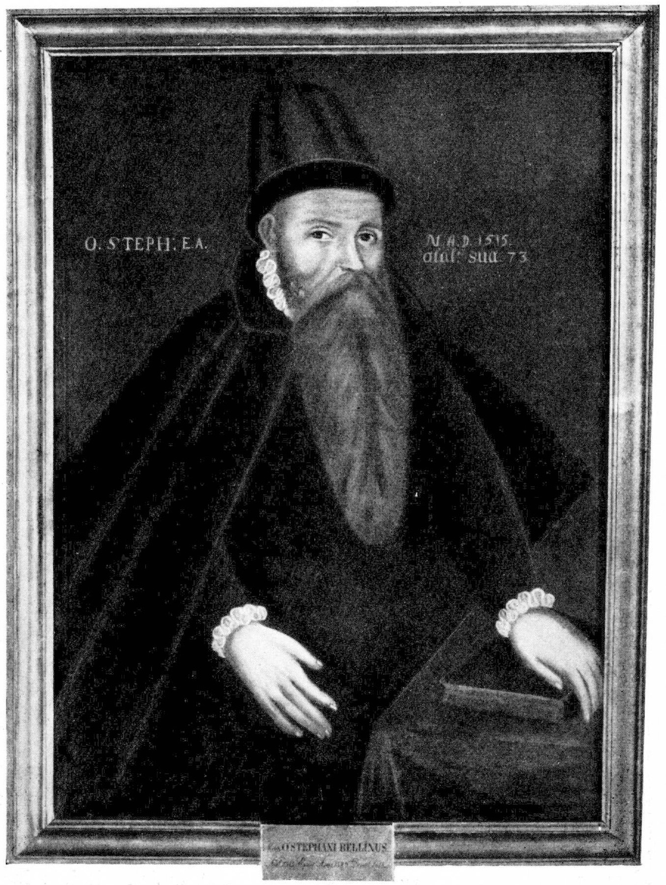 Biskopen i Västerås Olaus Bellinus. Oljemålning i Västerås domkapitel, målad 1573. Okänd konstnär.